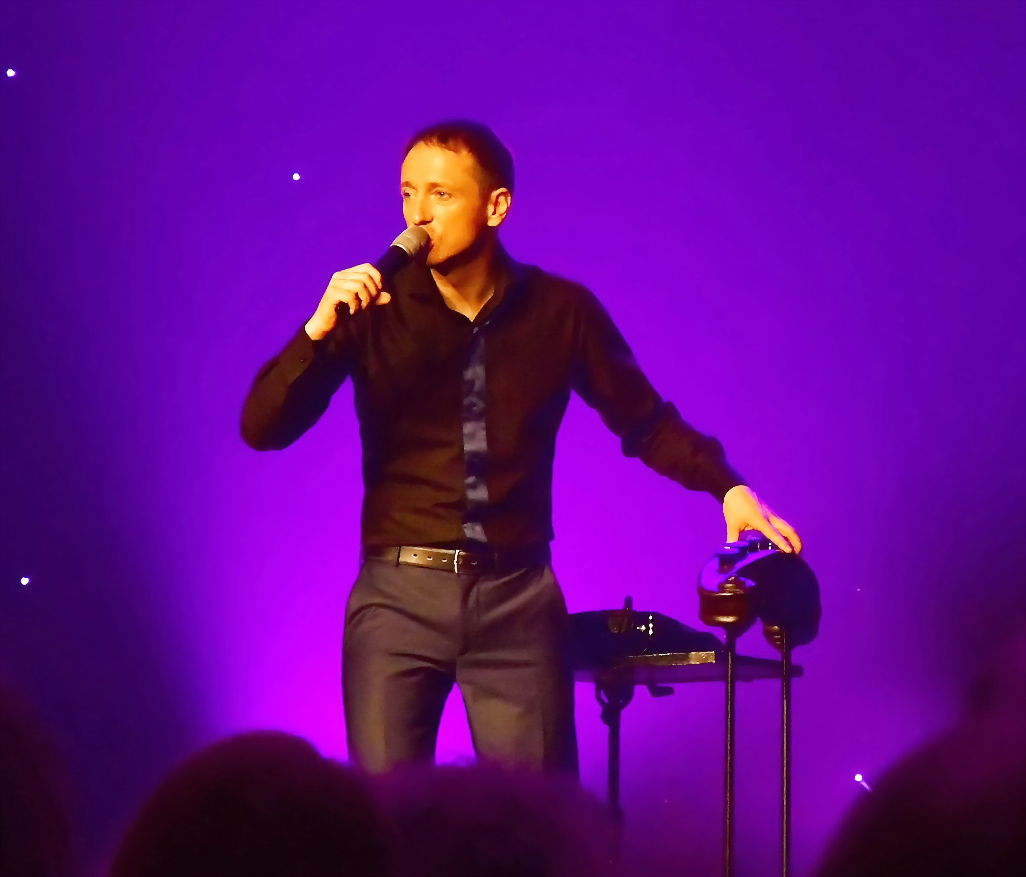 Martin O.